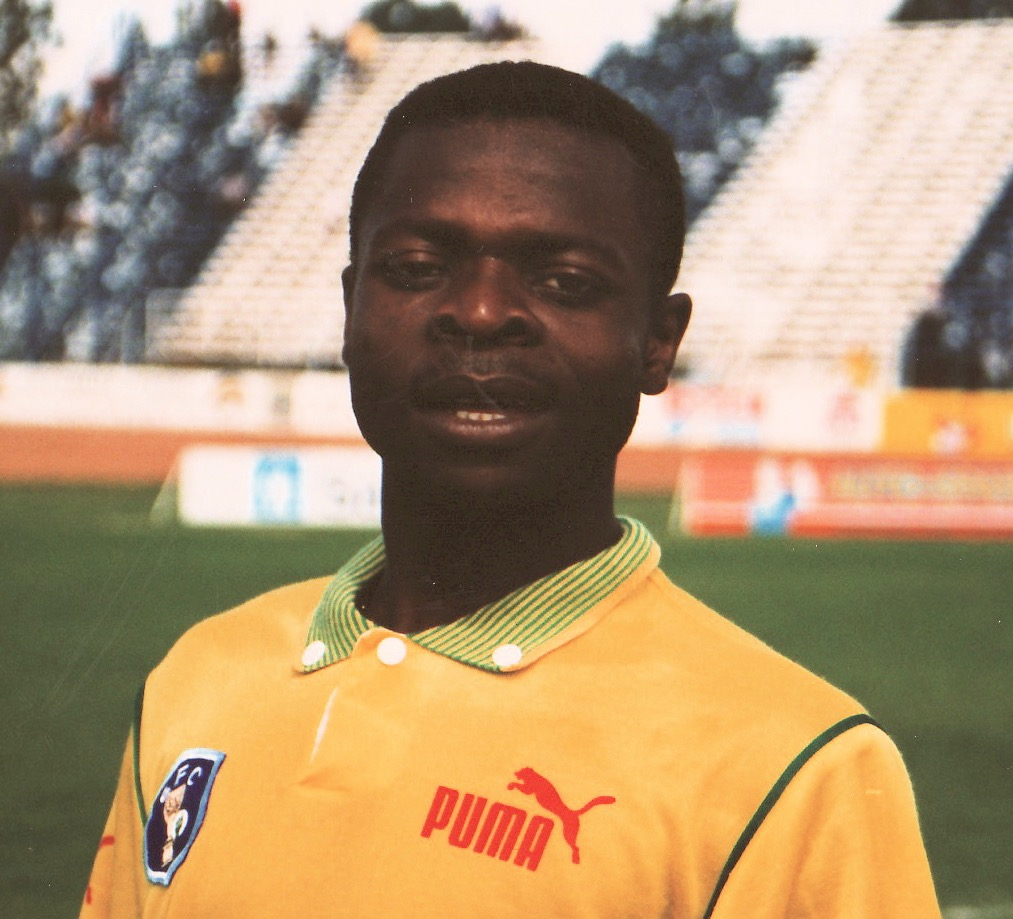 Daniel Mudau, 15 octobre 1995, HM Pitje Stadium